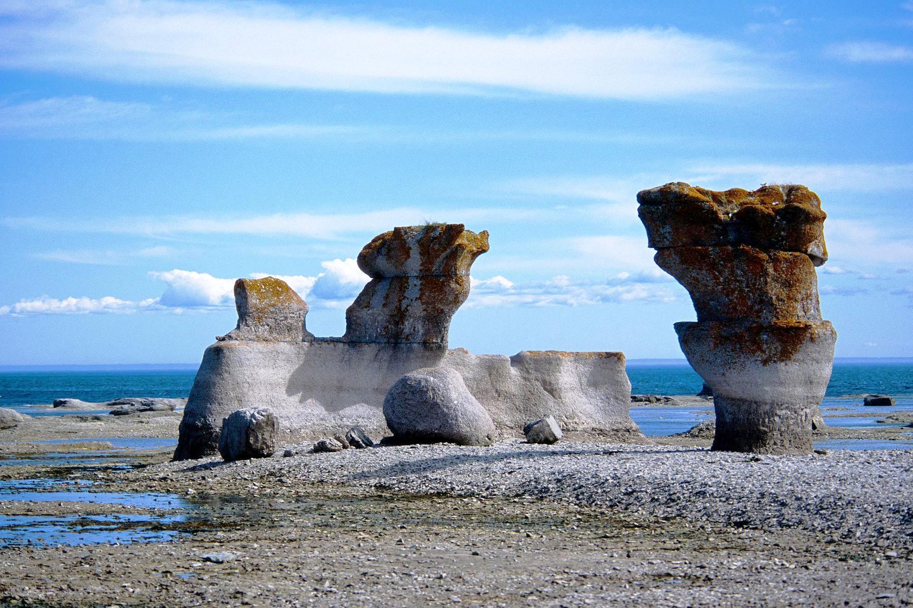 La réserve de Parc National du Canada de l'Archipel-de-Mingan. Les îles sont accessibles par l'entremise de bateliers reconnus par Parc Canada. Le parc compte une quarantaine d'îles et îlots calcaires et près de 1000 îlots granitiques. 9 Aôut 2005 L'Archipel-de-Mingan Côte-Nord,Minganie Quebec.Canada Nikon F4e +MB-23 Nikkor Zoom 80-400mm VR Kodak Ektachrome Pro E200